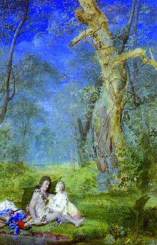 Paysage avec couple assis